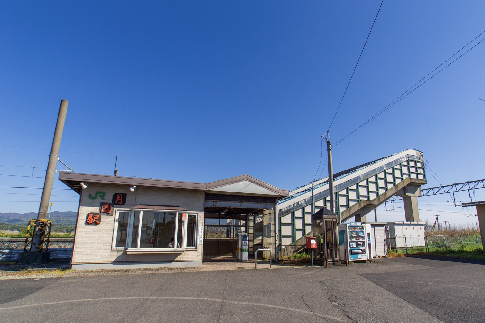 月岡駅の駅舎（2019年5月）